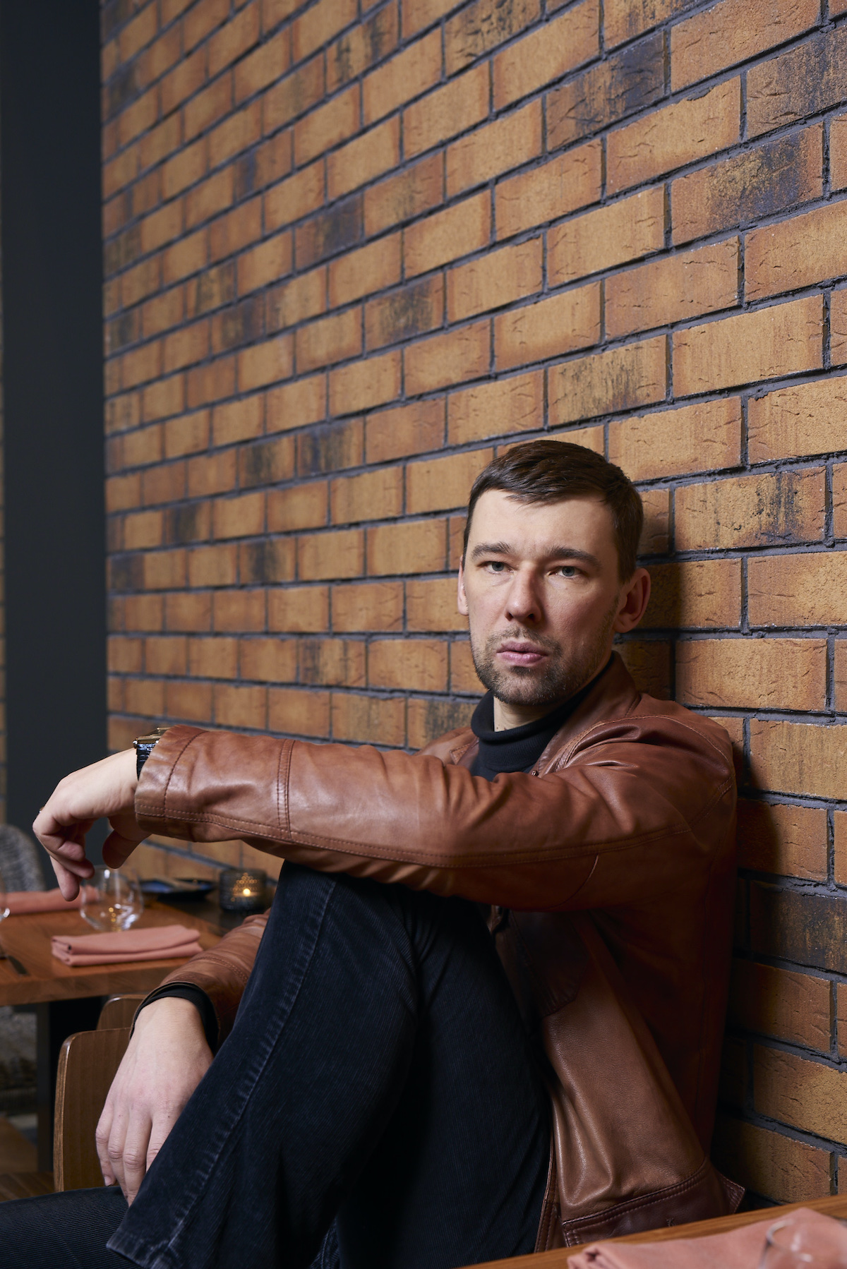 Erki Laur, näitleja.